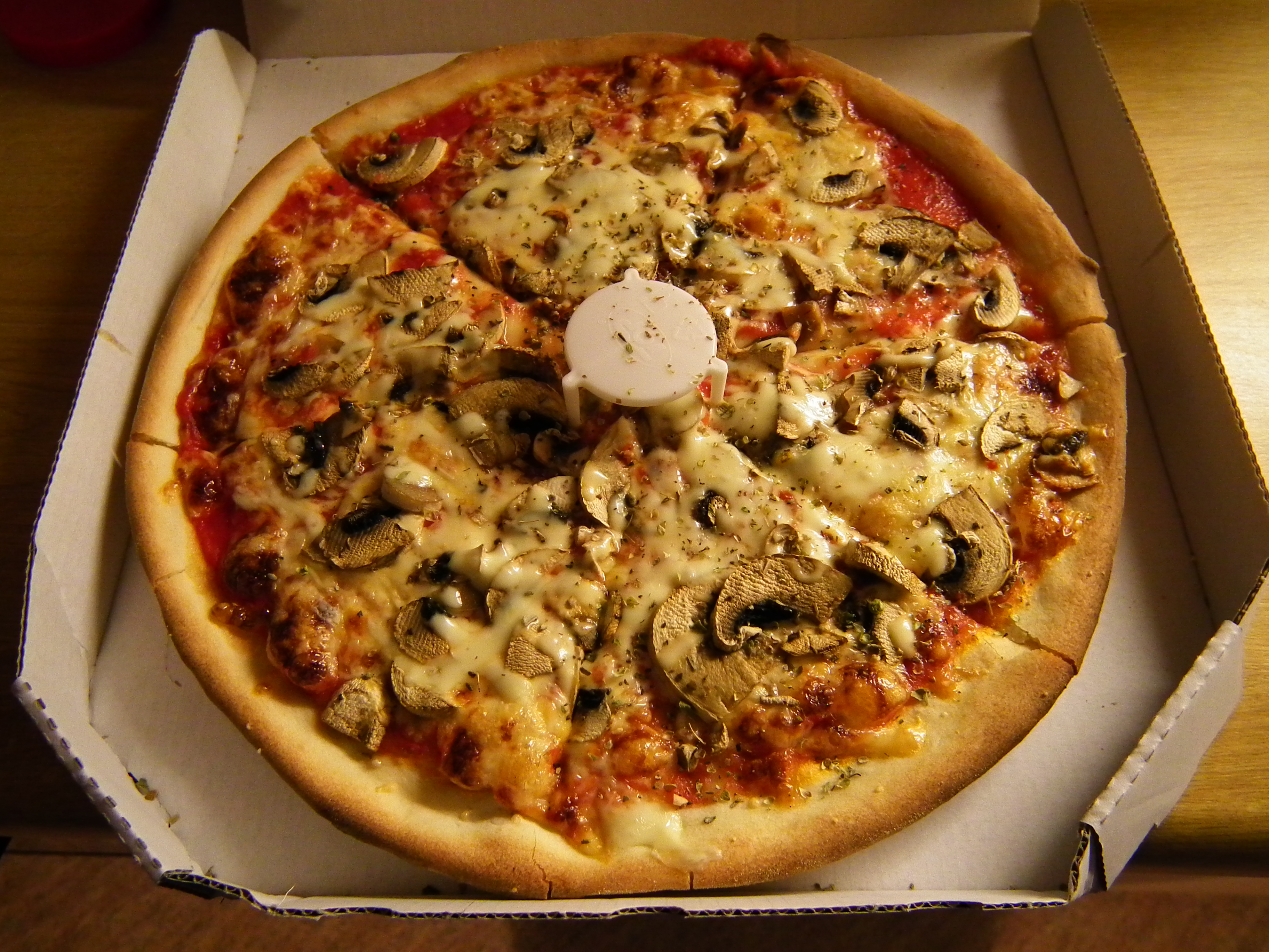 Pizza Funghi mit Pizzahalter, fotografiert in Deutschland